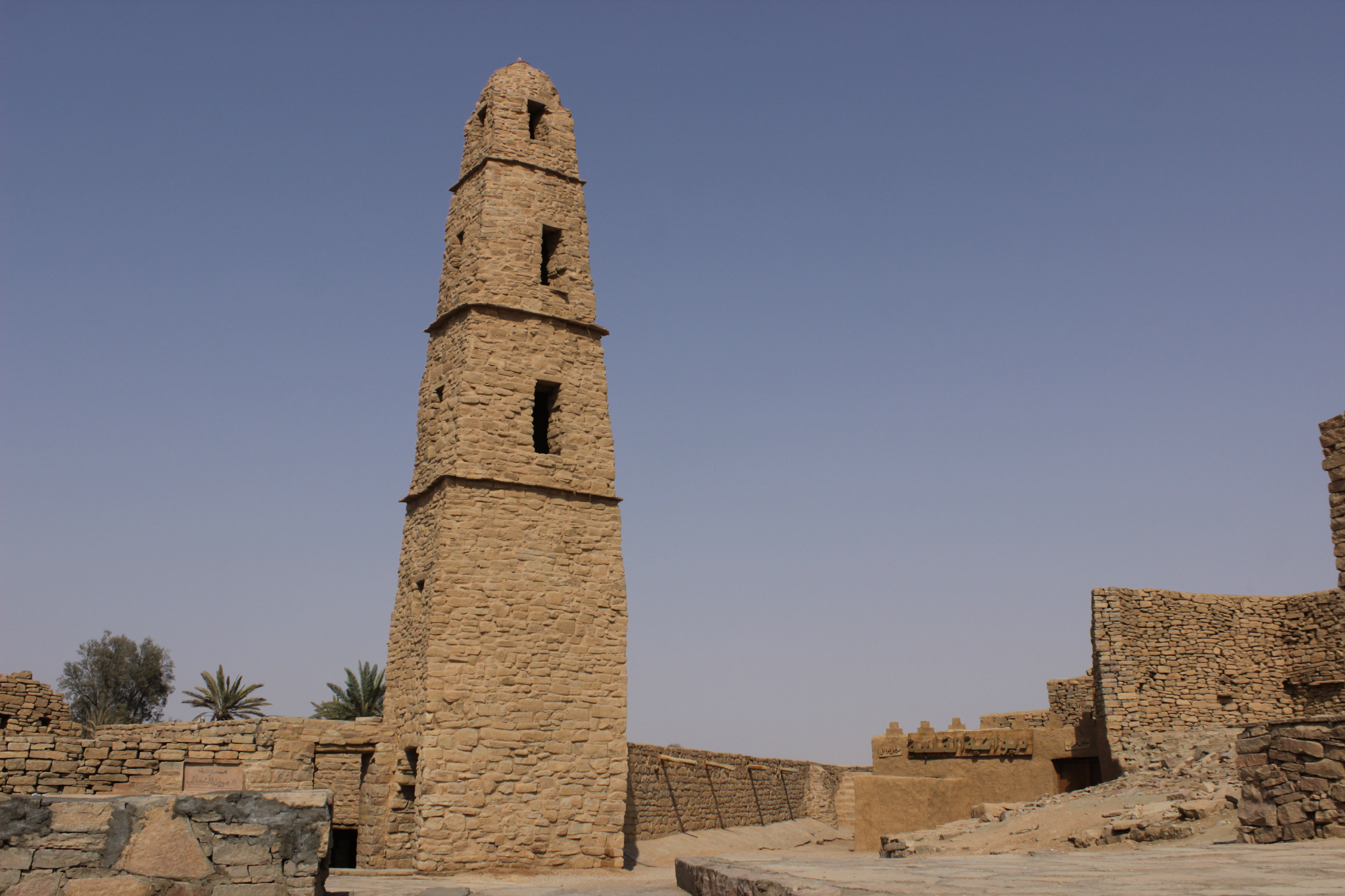 منارة مسجد عمر بجانب قلعة مارد